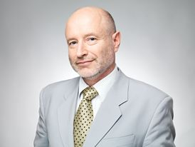 Ambasador RP